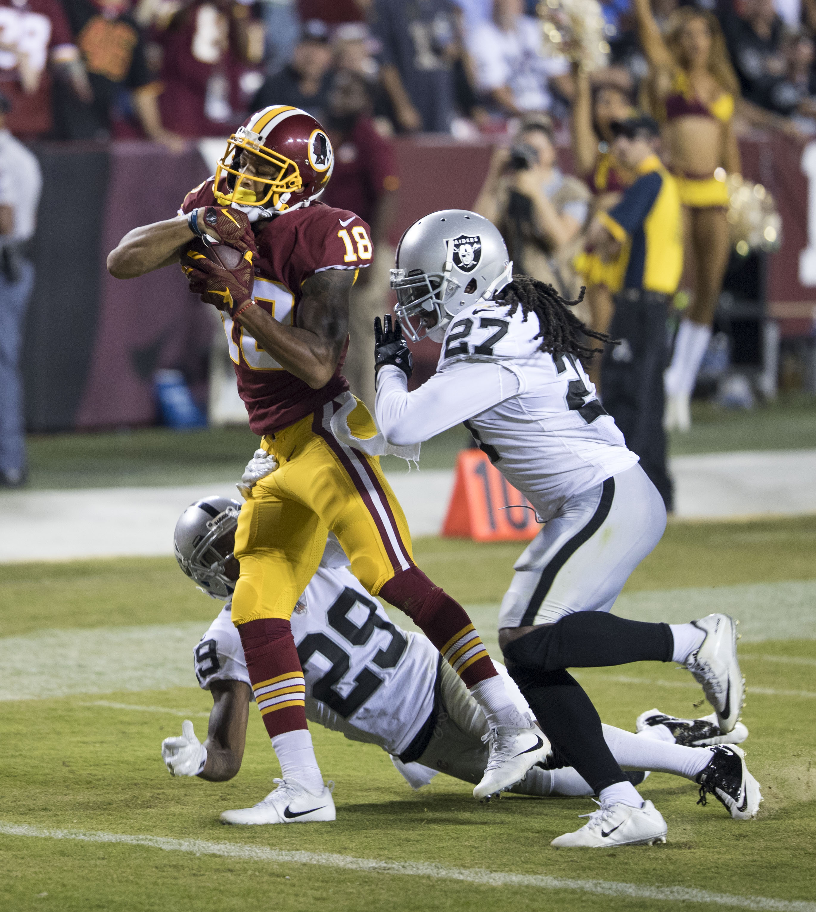 Raiders at Redskins 9/24/17